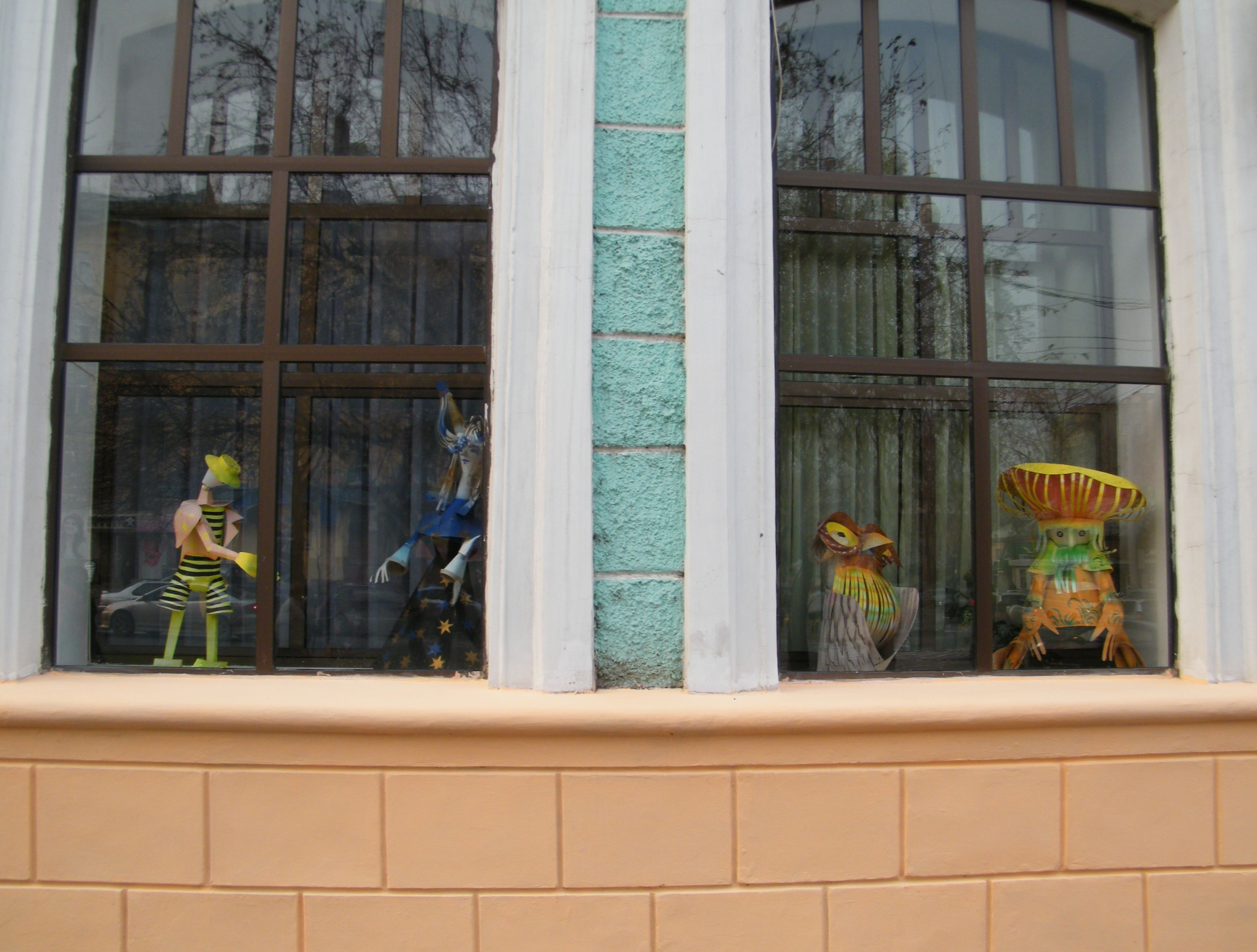 Хабаровск, краевой театр кукол.